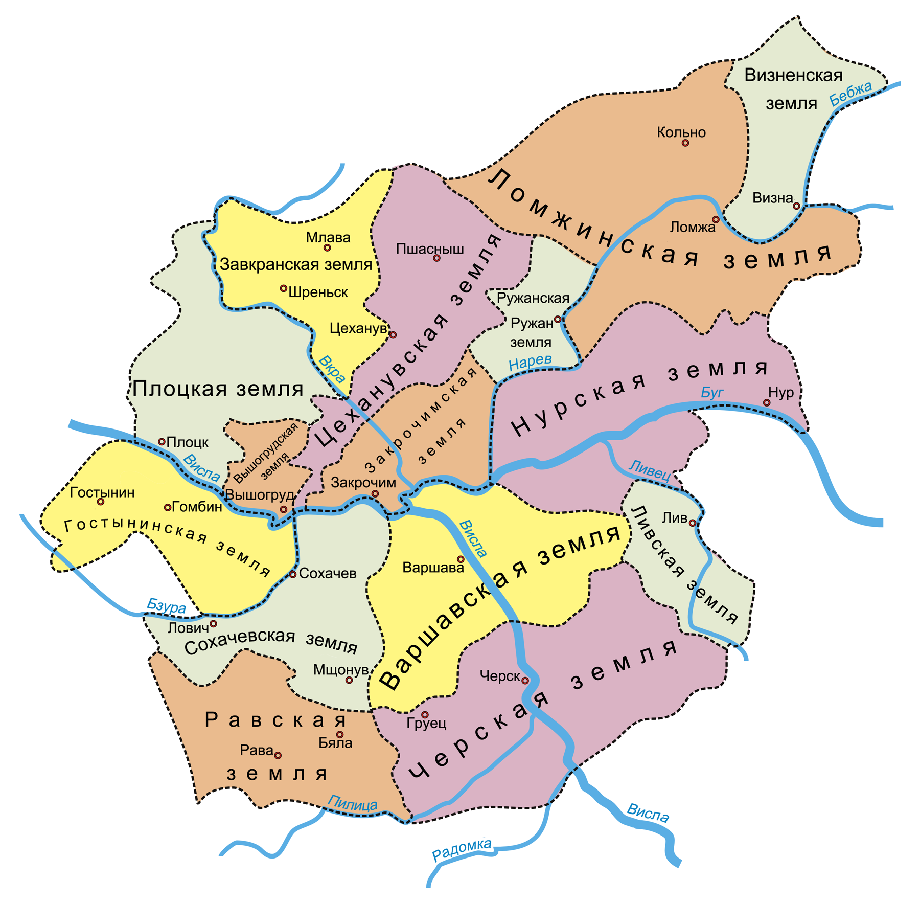 Земли Мазовья в XIII—XVIII веках